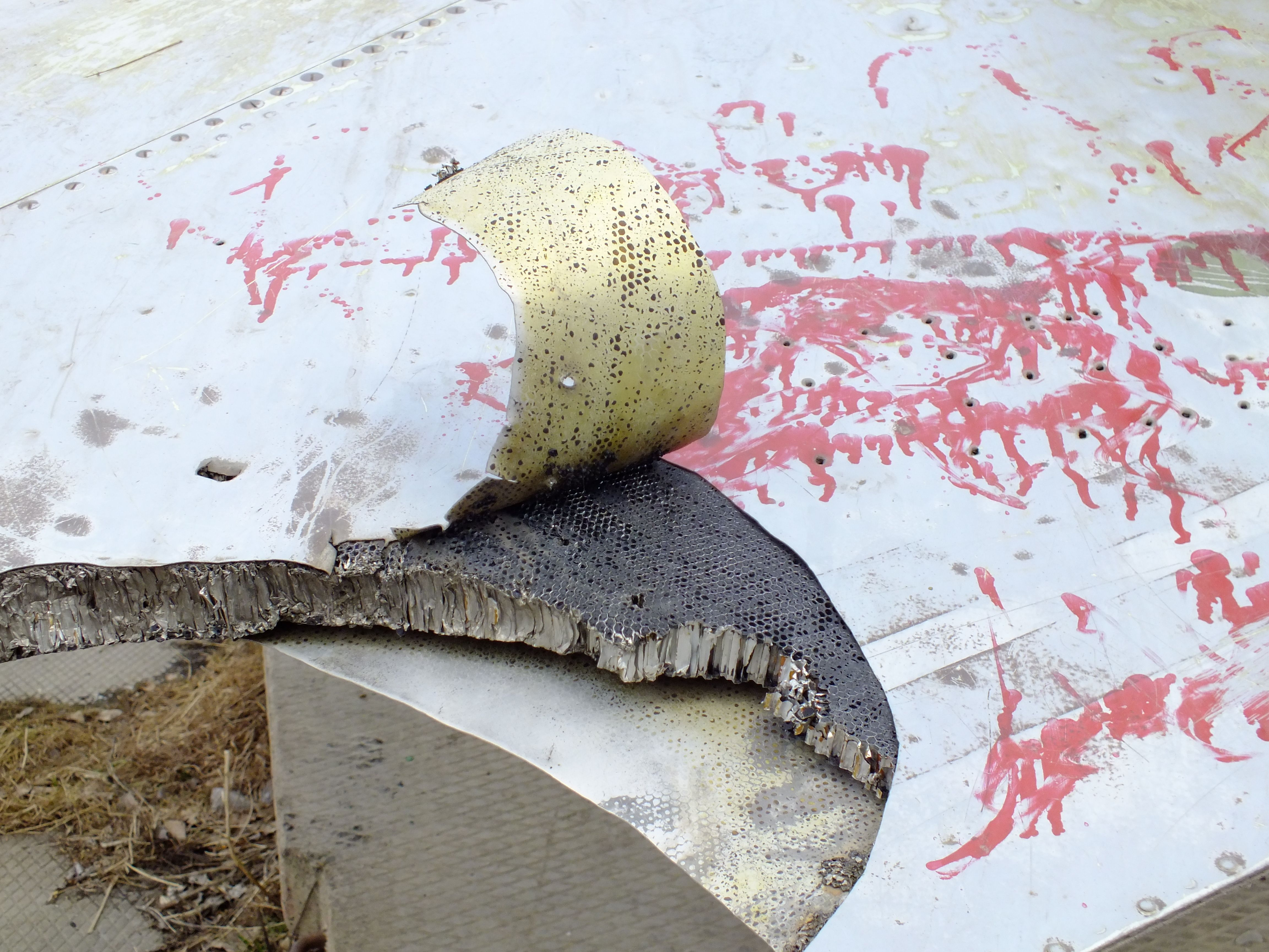 Миг-23 в селе Кремово Приморский край